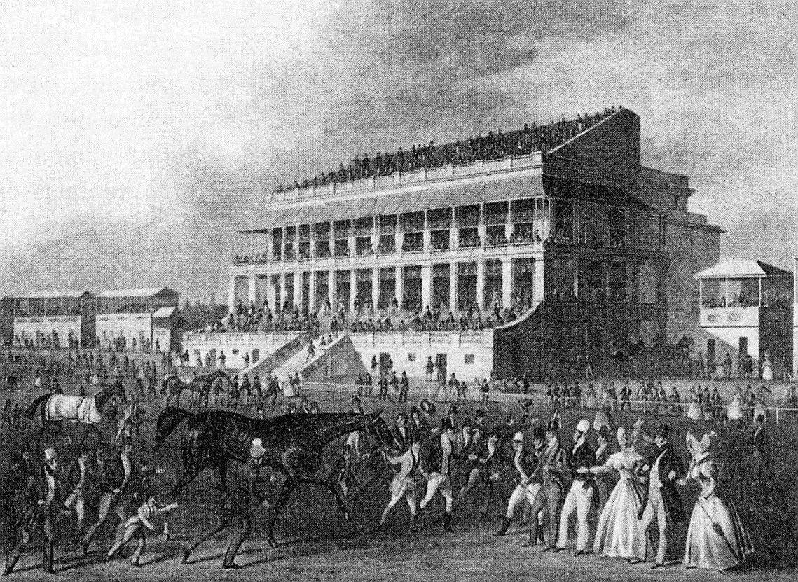 Epsom Grandstand Building 1830s